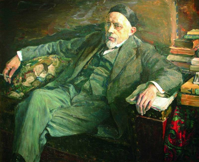 Портрет академика А.Н. Северцова.